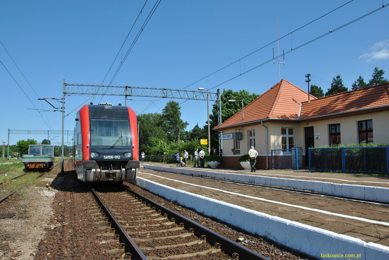 Stacja w Trzcińcu.